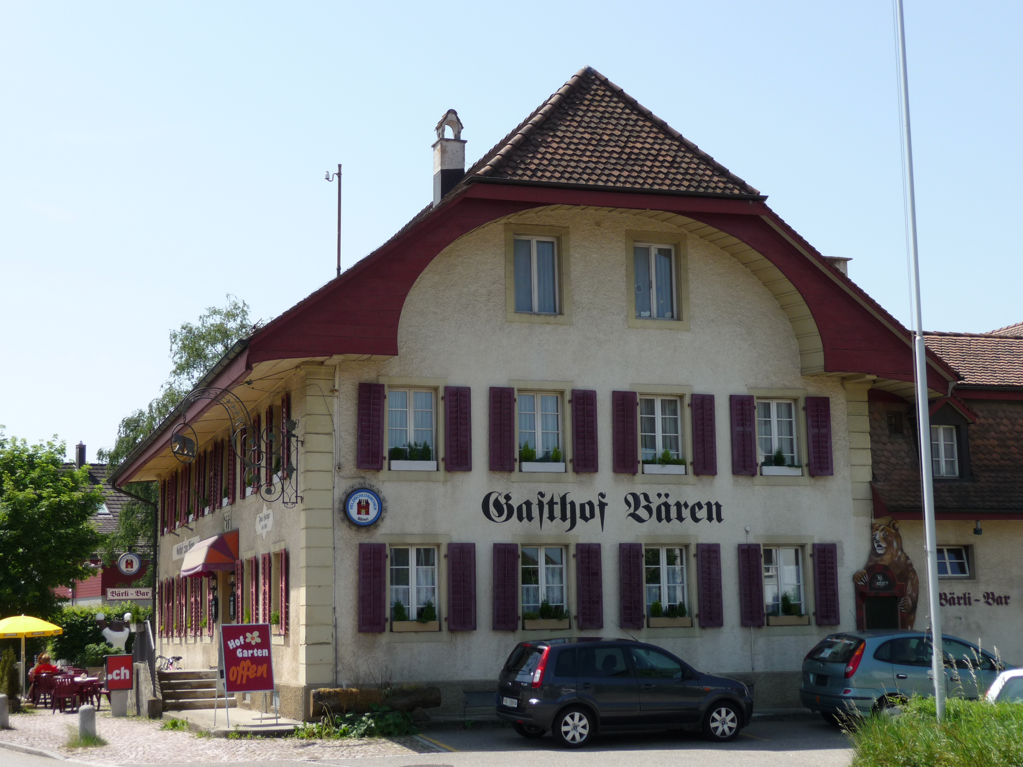 Muhen